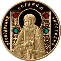 Памятна монета банку Білорусі "Серафим Саровський". Реверс